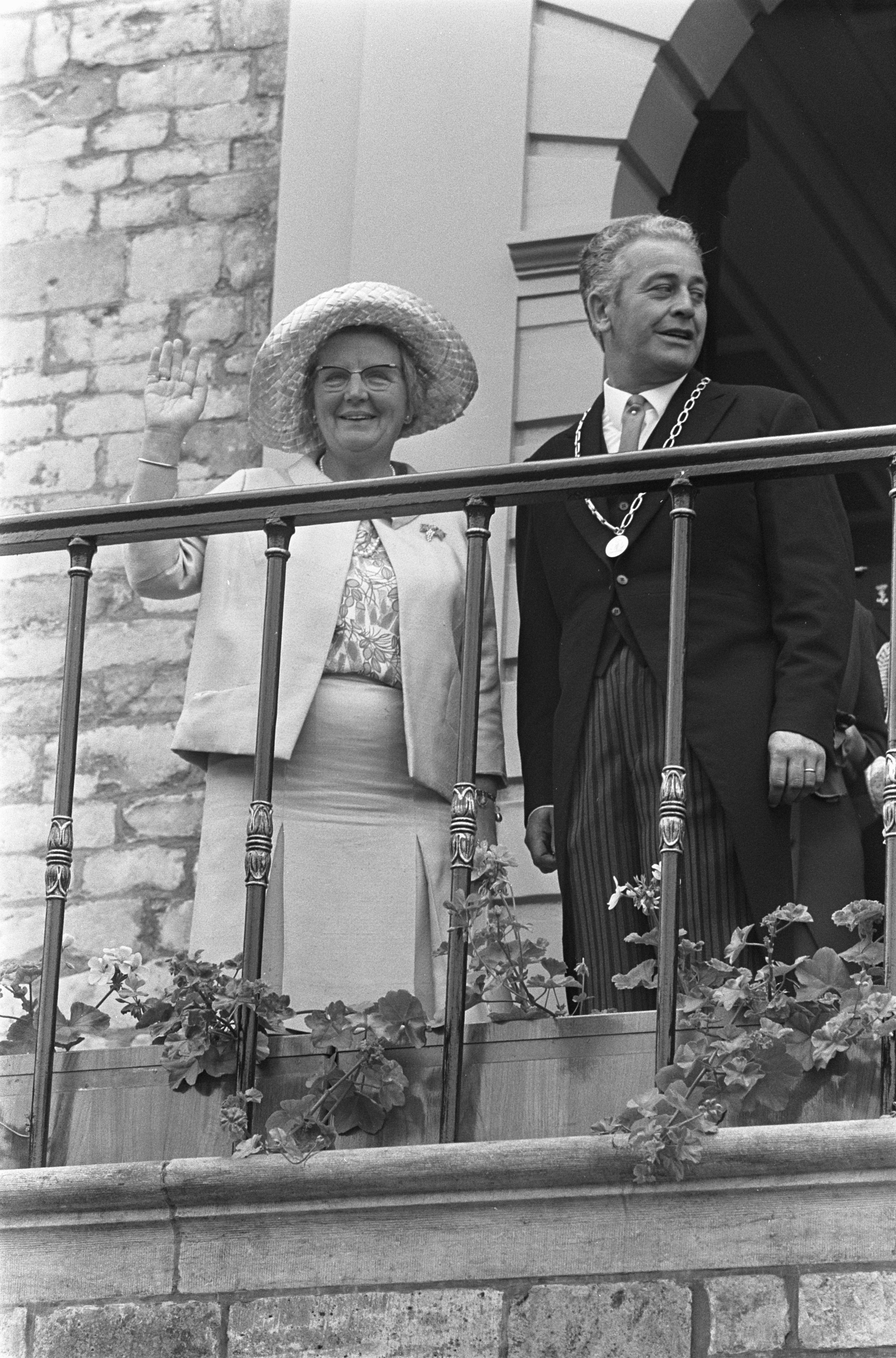 Collectie / Archief : Fotocollectie Anefo Reportage / Serie : Hare Majesteit bezoekt Zeeland Beschrijving : Op het stadhuis te Hulst, met burgemeester P.J.G. Molthoff Datum : 20 juni 1968 Locatie : Hulst, Zeeland Trefwoorden : koninginnen, stadhuizen Persoonsnaam : Juliana (koningin Nederland), Molthoff, P.J.G. Fotograaf : Fotograaf Onbekend / Anefo Auteursrechthebbende : Nationaal Archief Materiaalsoort : Negatief (zwart/wit) Nummer archiefinventaris : bekijk toegang 2.24.01.05 Bestanddeelnummer : 921-4490